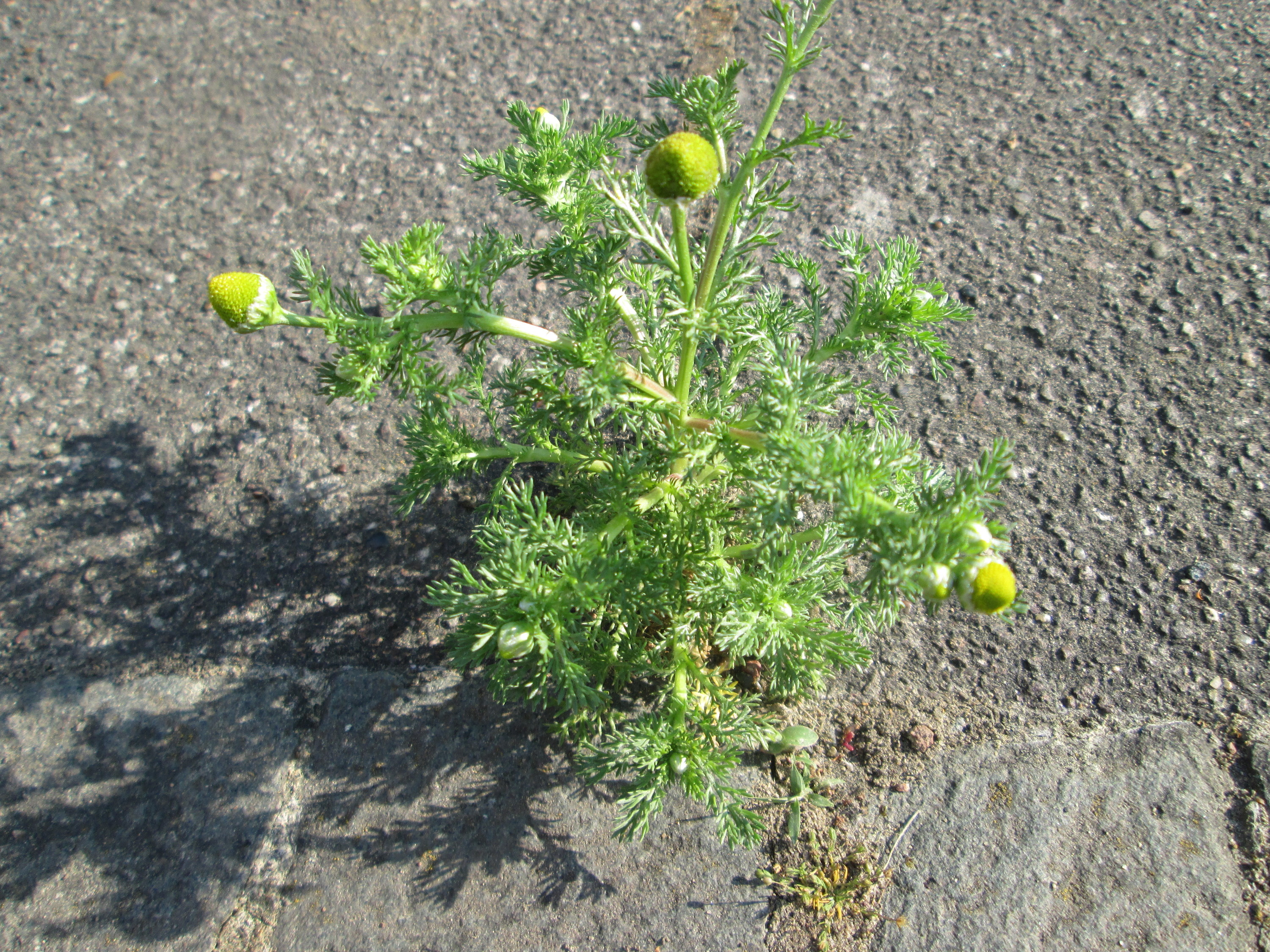 Strahlenlose Kamille (Matricaria discoidea) in Sankt Arnual